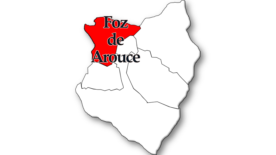 População